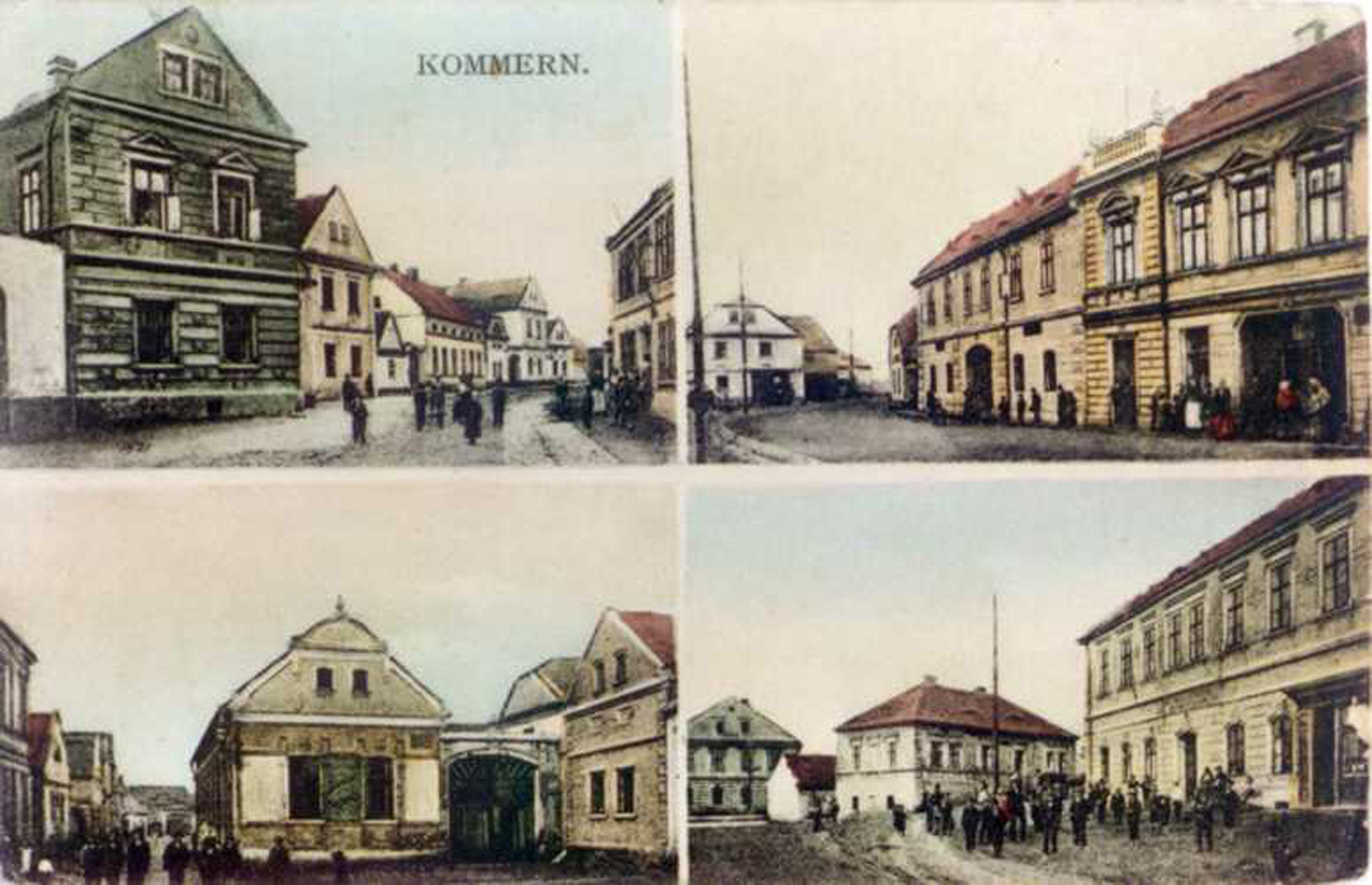 Ehemaliges Dorf Komořany (Kommern) bei Most (Brüx) in Tschechien.